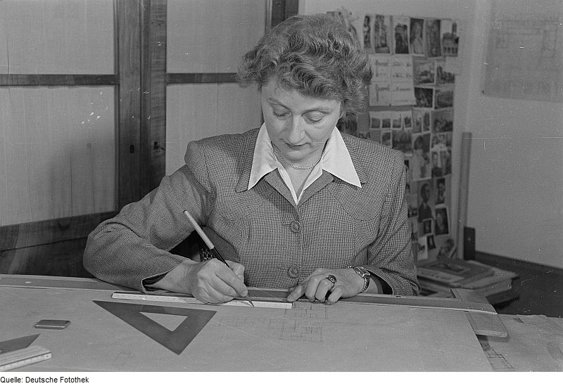 Original image description from the Deutsche FotothekPorträt einer Architektin beim Erstellen einer Konstruktionszeichnung